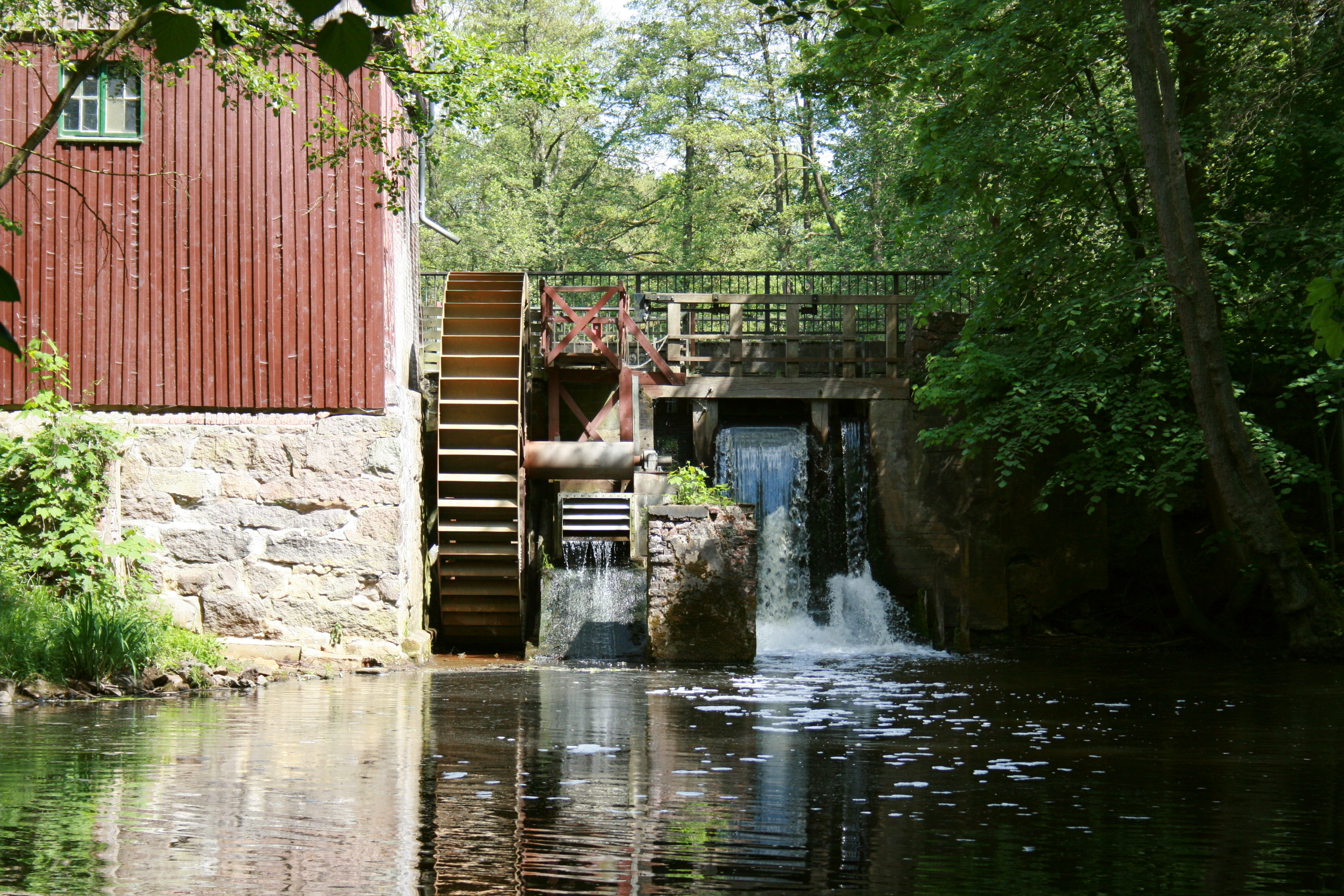 Massermühle an der Veerse in Schneverdingen-Lünzen